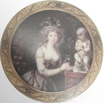 Portrait of Louise d’Aumont (1759-1826)